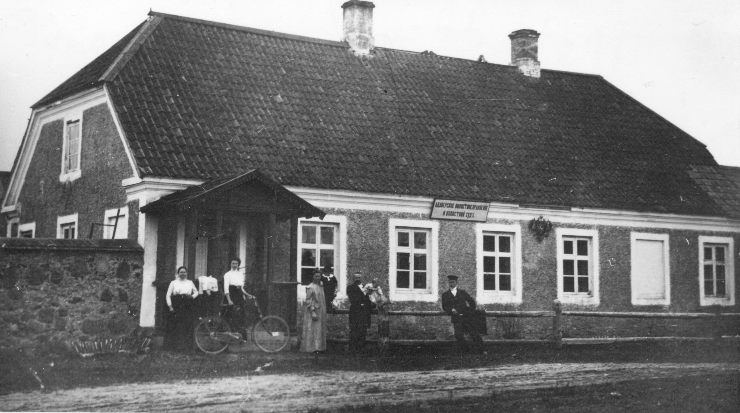 1868 ehitatud Adavere vallamaja, pildistatud 1911